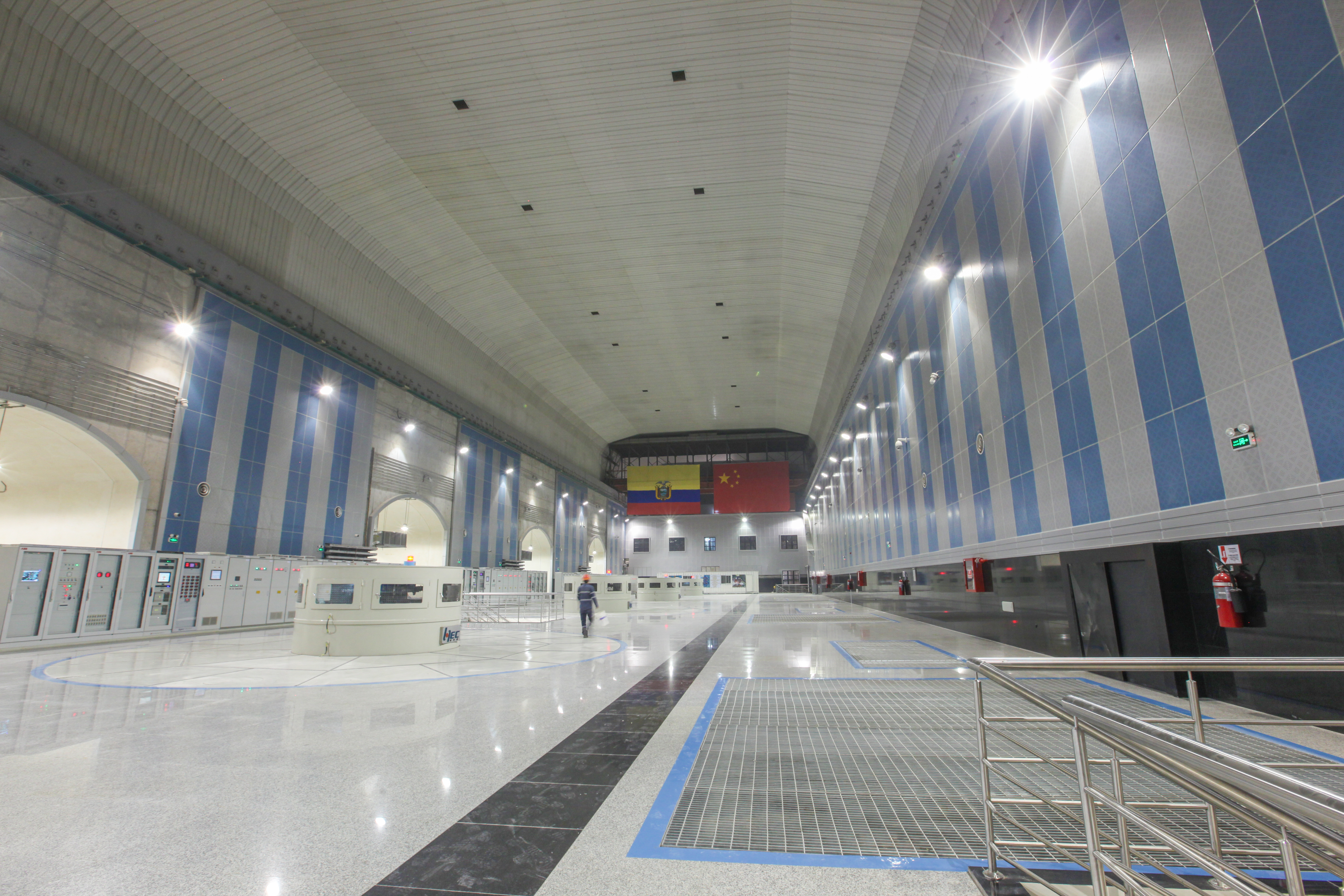 Central Hidroeléctrica Coca Codo Sinclair durante su construcción